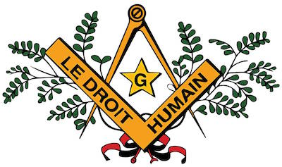 Emblème de la Fédération internationale "Le Droit Humain" fondé en 1912.